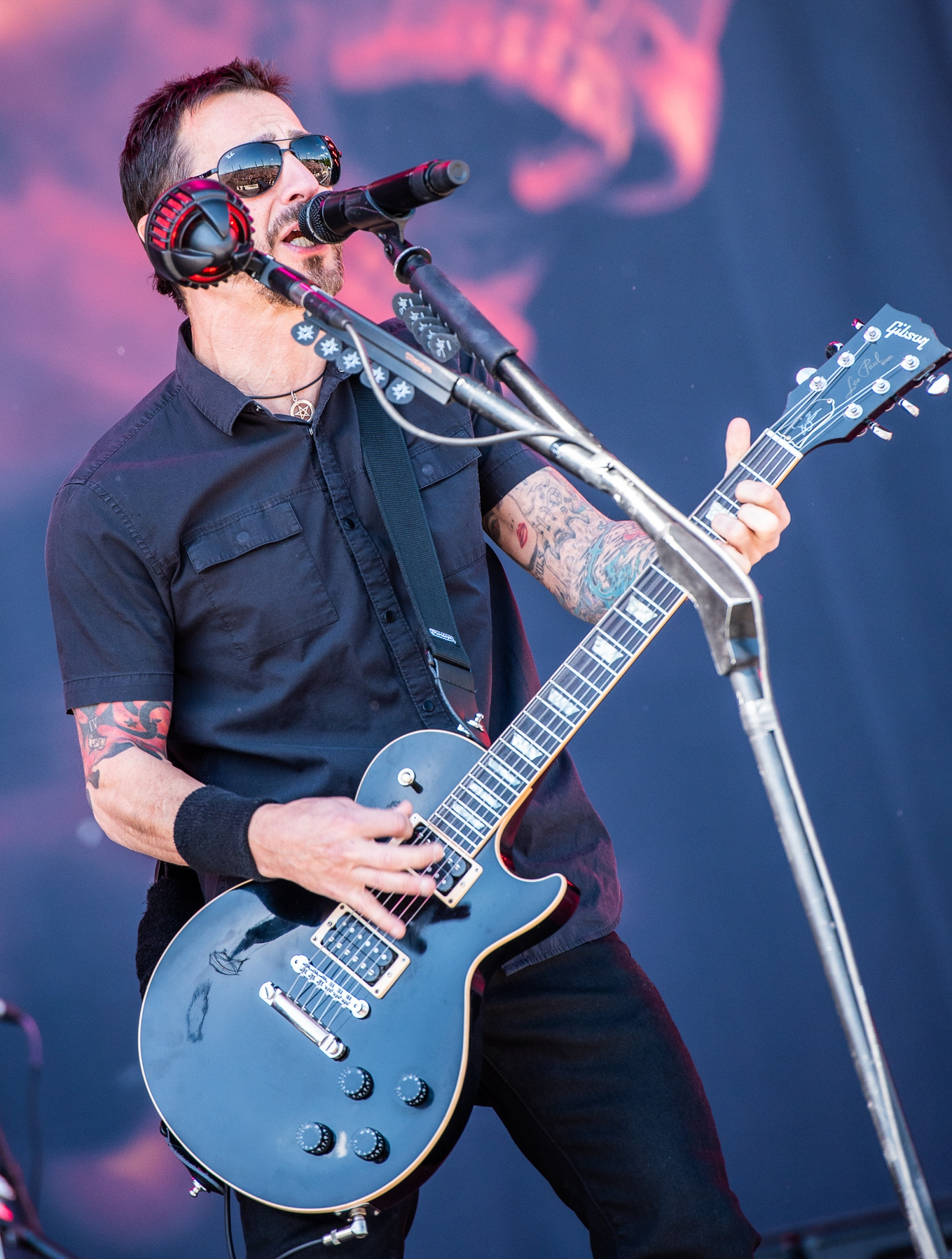 ARGO-Konzerte,Godsmack,Konzert,Livekonzert,Livemusik,Musik,RiP,Rock im Park 2019,Sully Erna,Zeppelin Stage